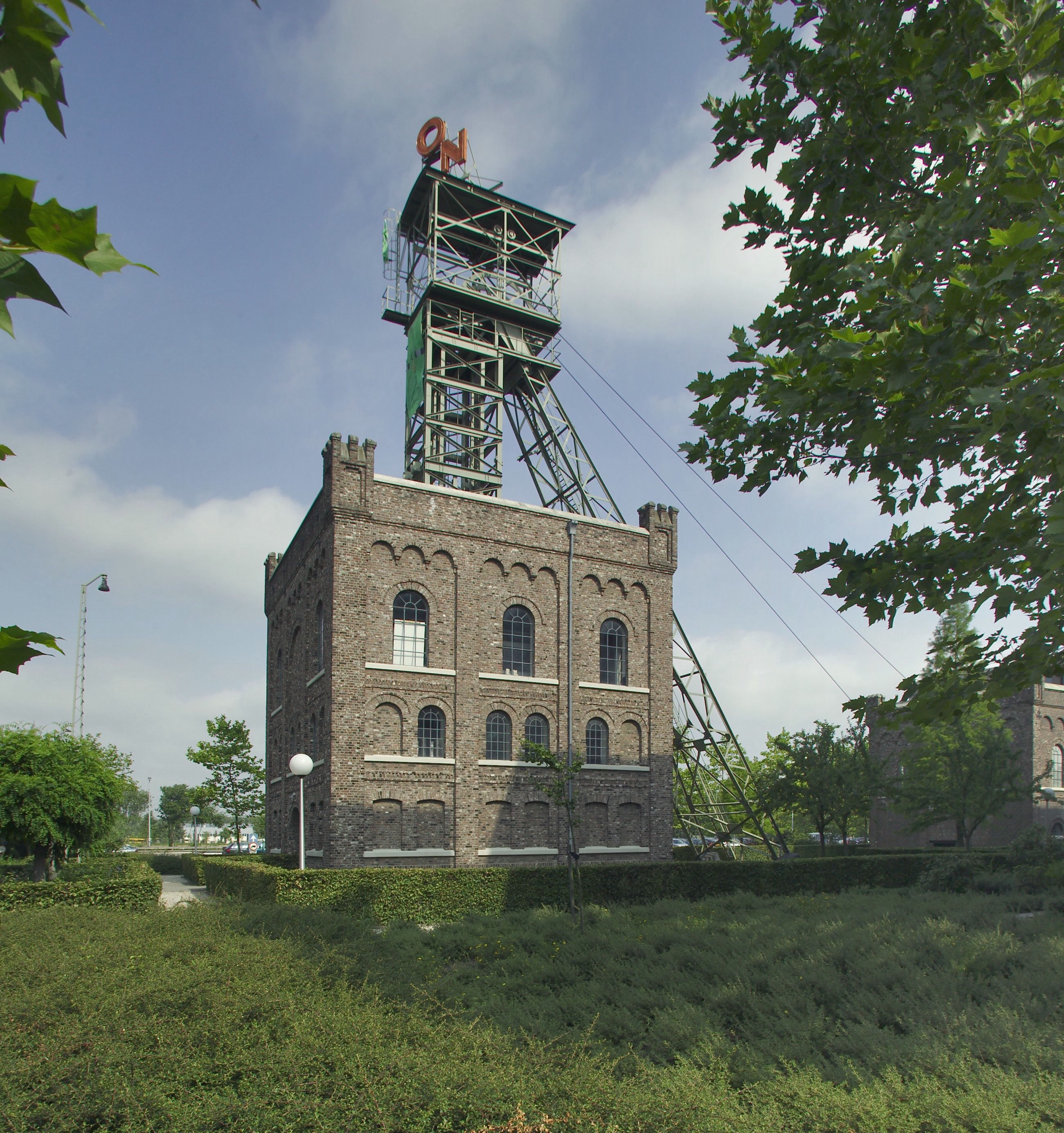 Oranje Nassaumijn 1: Schatgebouw van schacht 1 met hijsinstallatie (opmerking: Gepubliceerd in ANWB Monumentenboek Nederland, 2003)